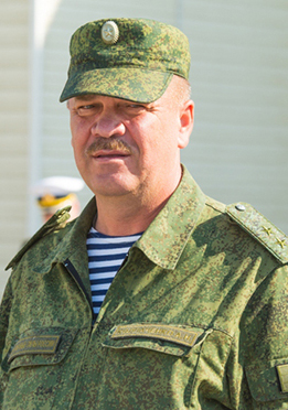 Начальник Береговых войск Военно-Морского флота России генерал-лейтенант Колпаченко Александр Николаевич